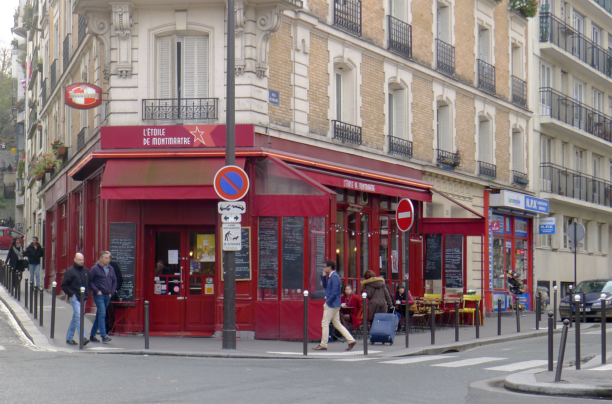 Rue Duhesme (L'étoile de Montmartre) - Paris XVIII